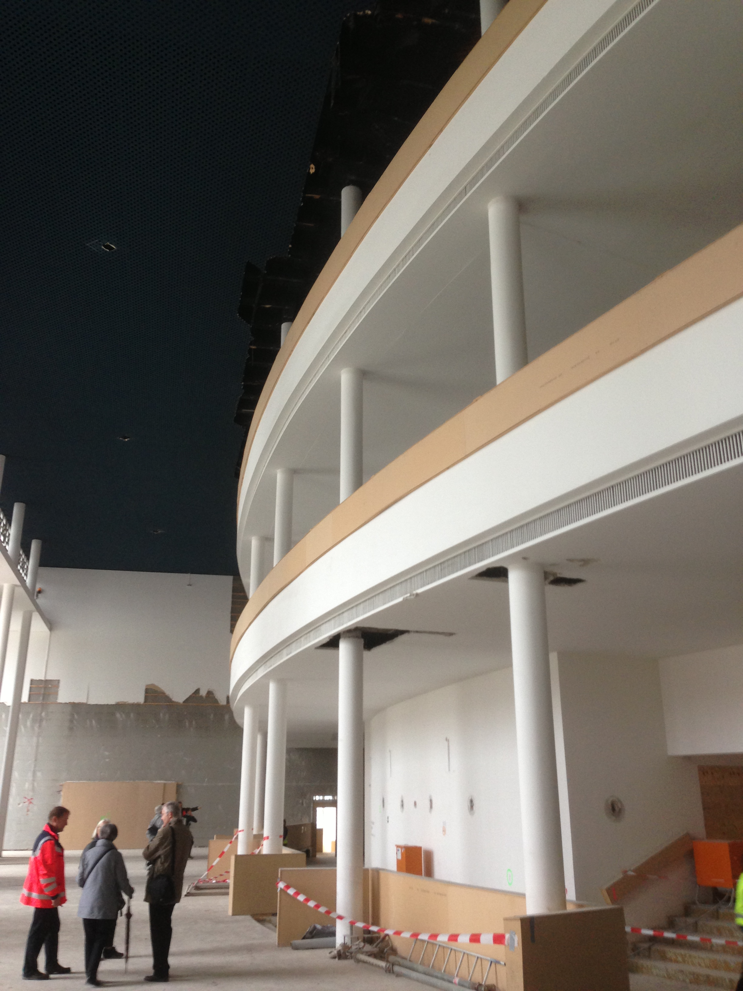 Oper der Stadt Köln, erbaut von Wilhelm Riphahn, während des Tages des offenen Denkmals am 7. September 2013 (während der Sanierungsarbeiten)